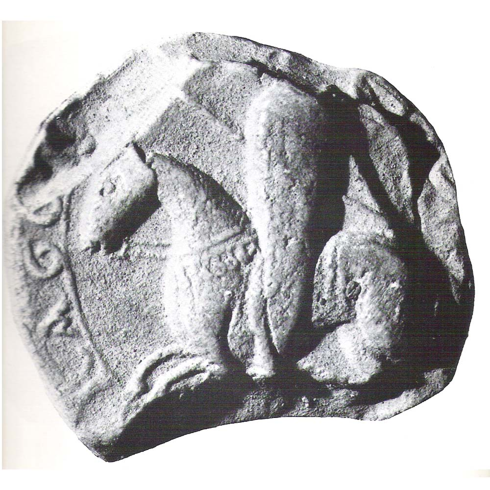 RAIMVNDVS BERENGARII COMES BARCHINONENSIS ET PRINCEPS REGNI ARAGONENSIS